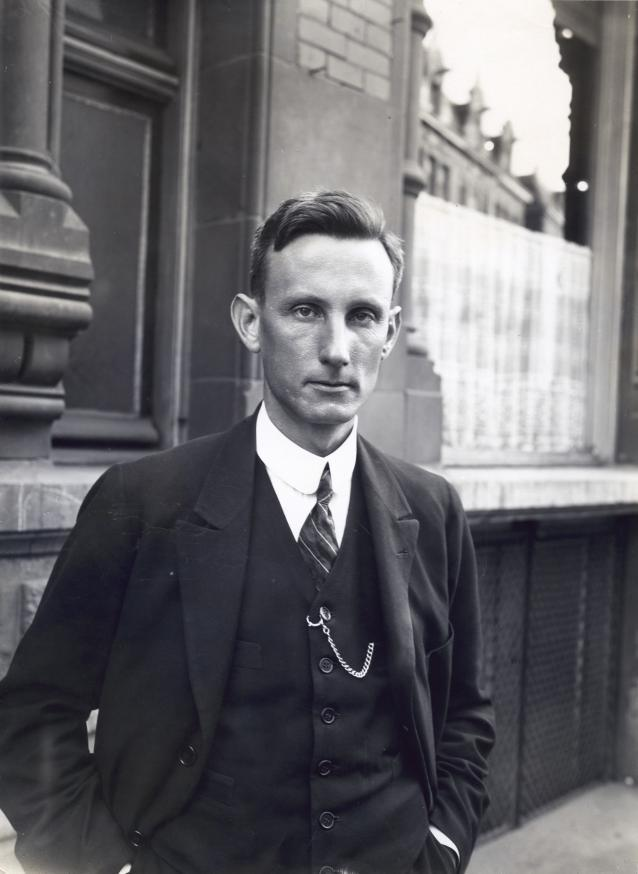 Portret van politicus Adolf Marcus Joekes, Nederland 1930-1935.